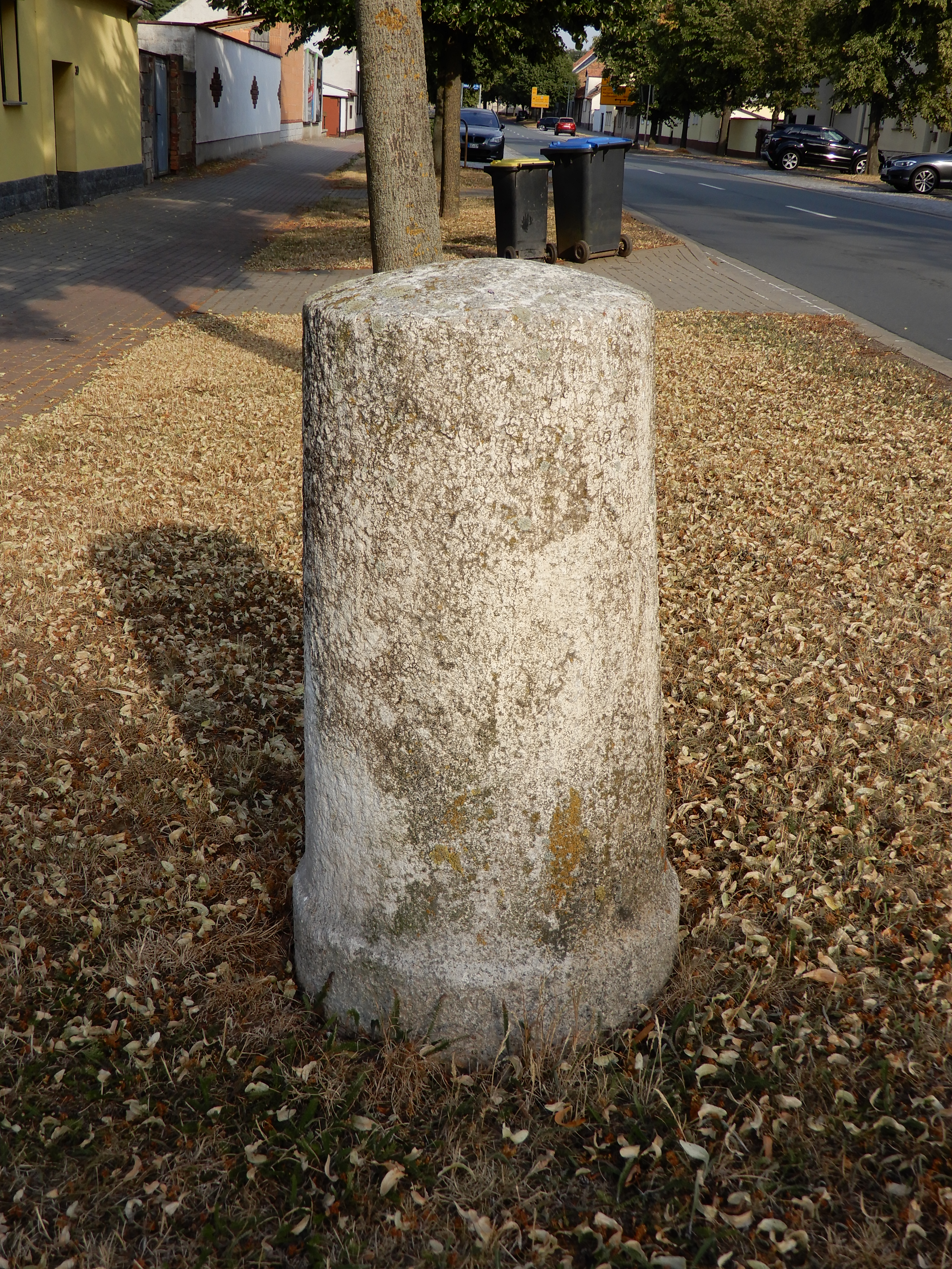 Meilenstein Quedlinburger Straße